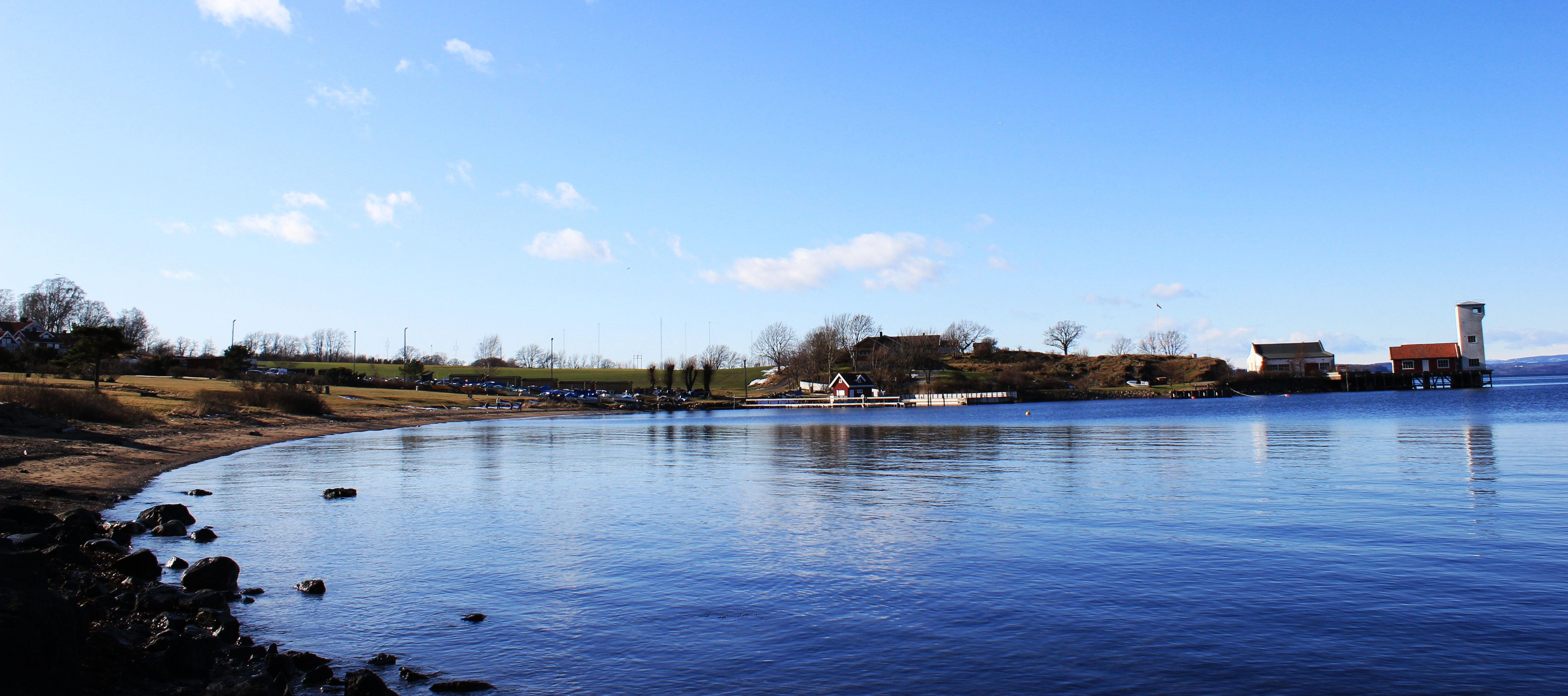 Tronvikstranda i februar 2012